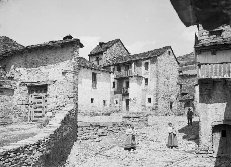 Imatge